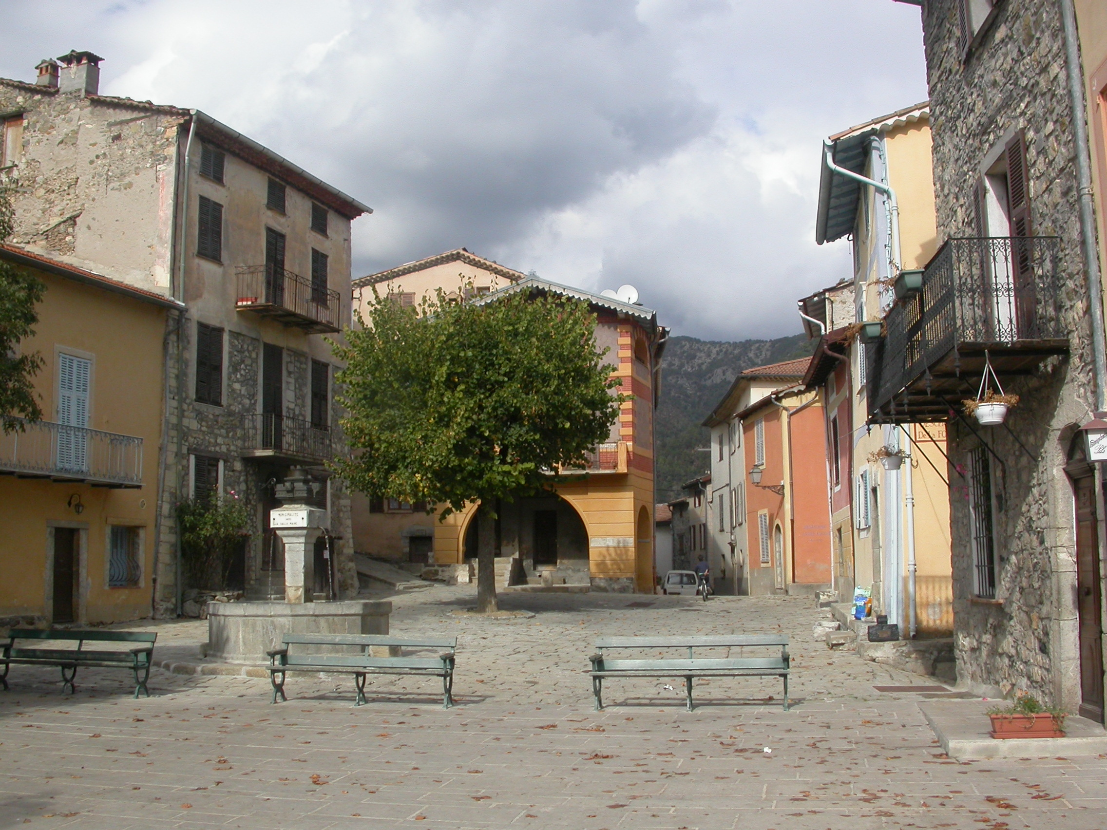 place du village de la Tour, Alpes-Maritimes, France